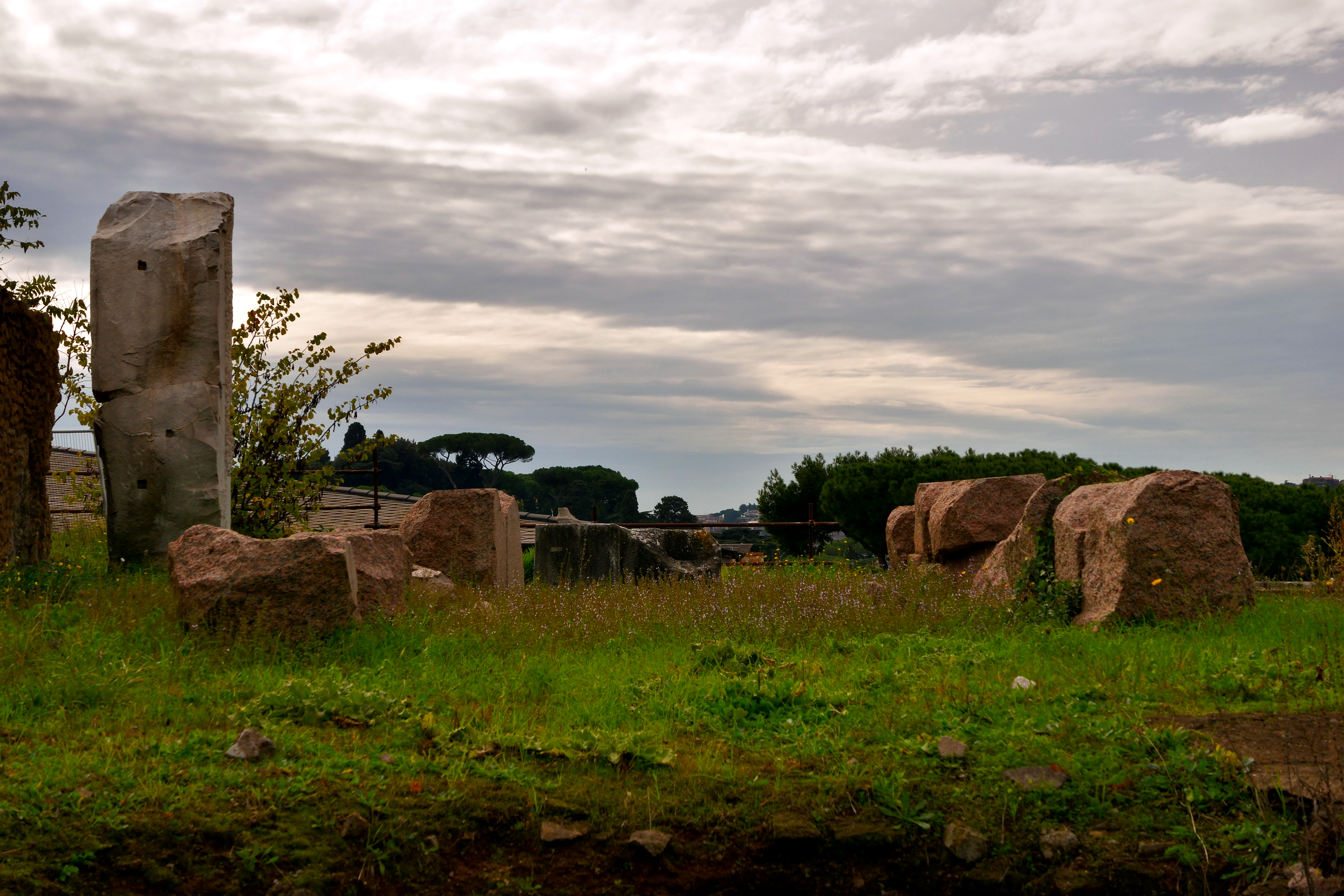 Fragmente vom Apollotempel auf dem Palatin